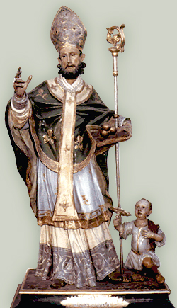 Statua lignea policroma di san Nicola di Bari, opera di Paolo Saverio di Zinno (sec. XVIII). San Severo, chiesa di san Nicola.